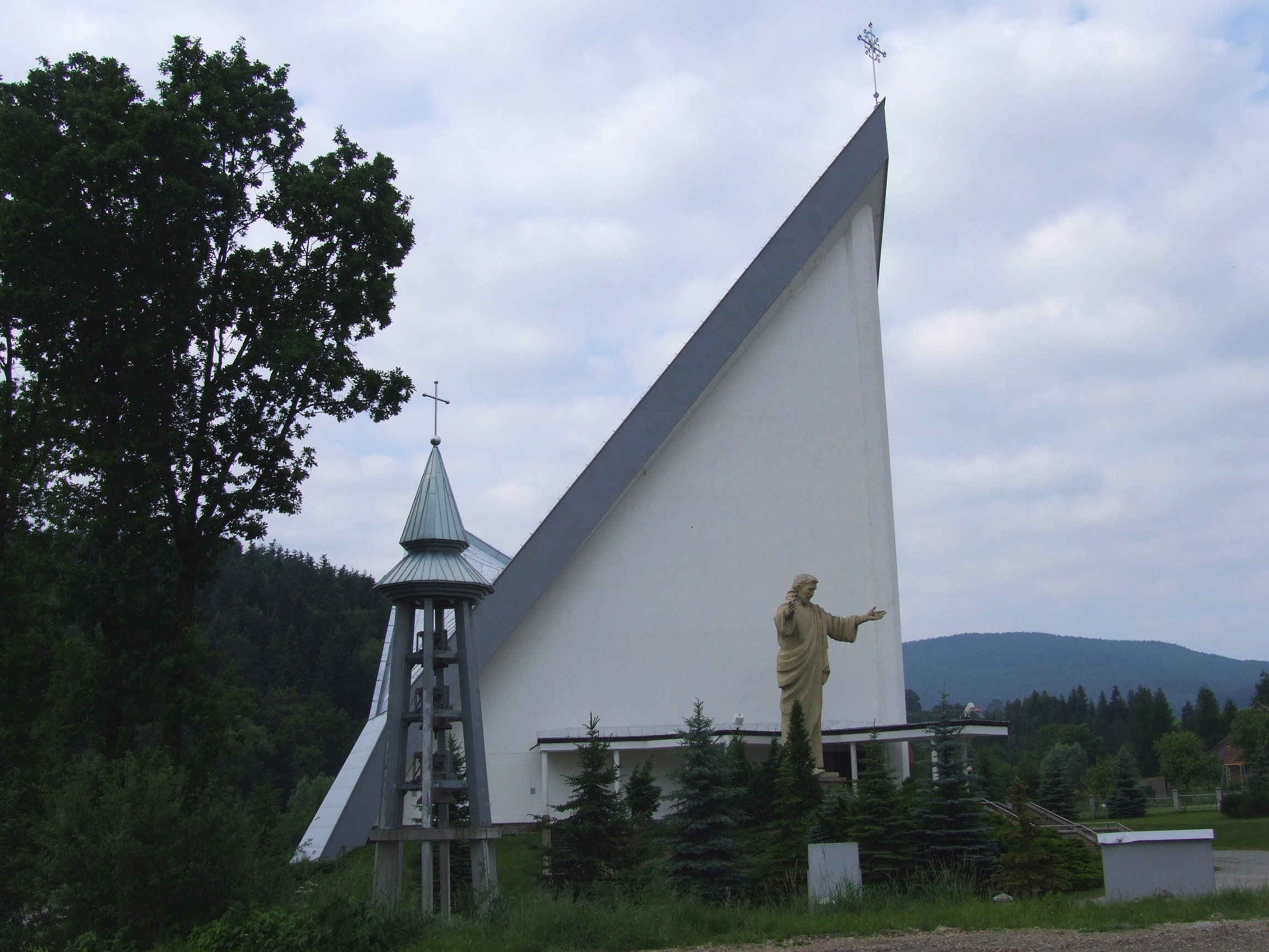 Kościół w Starej Wsi (powiat limanowski)